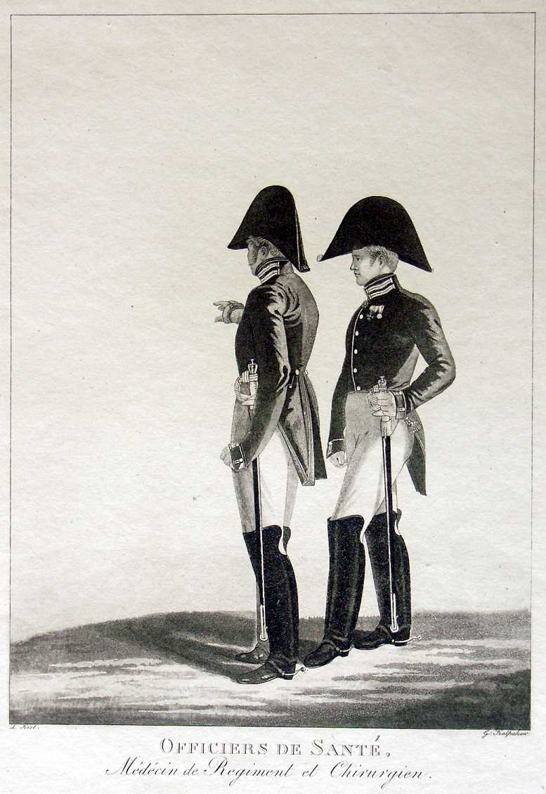 Лекари